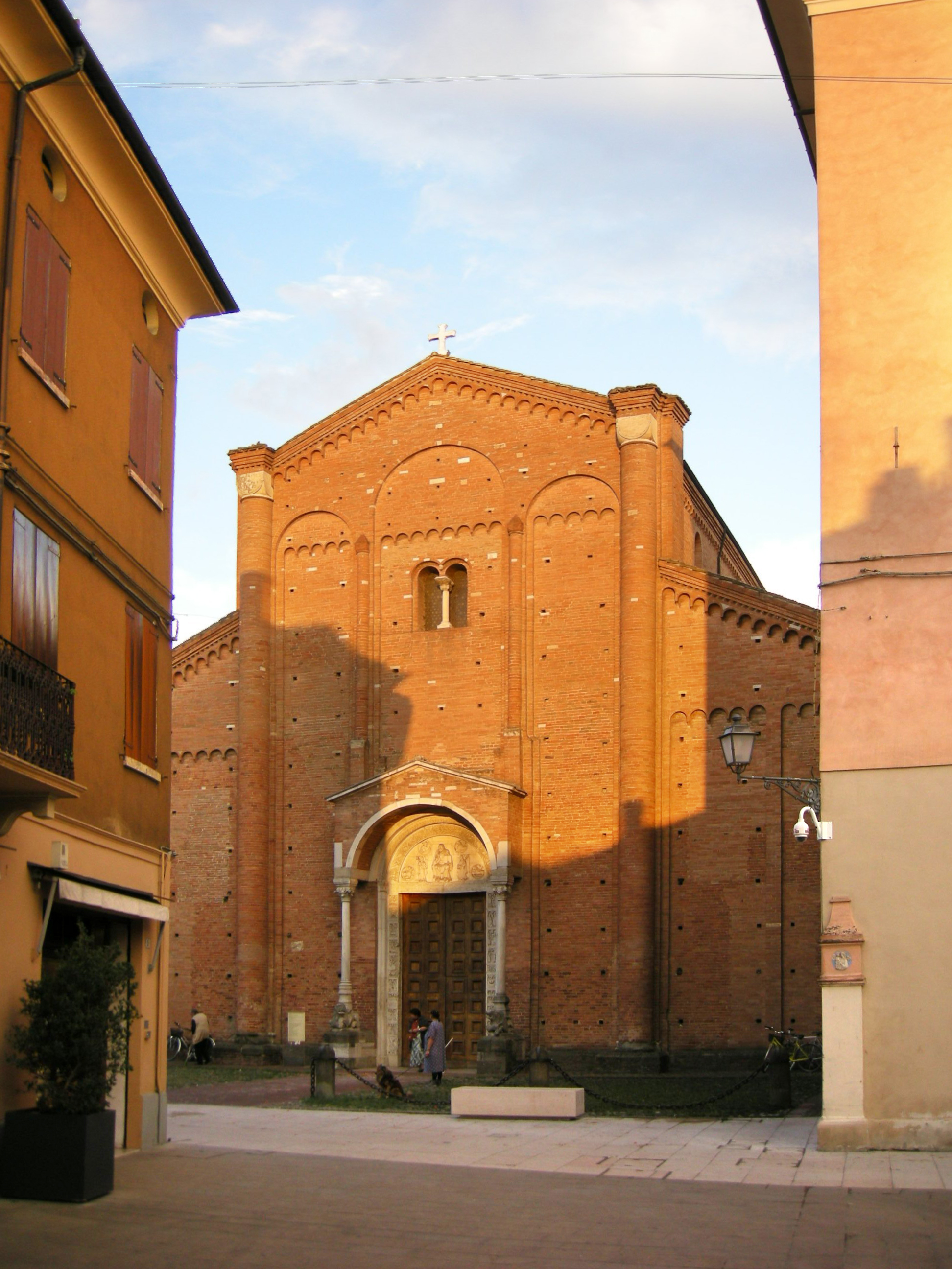 Abbazia di nonantola, facciata